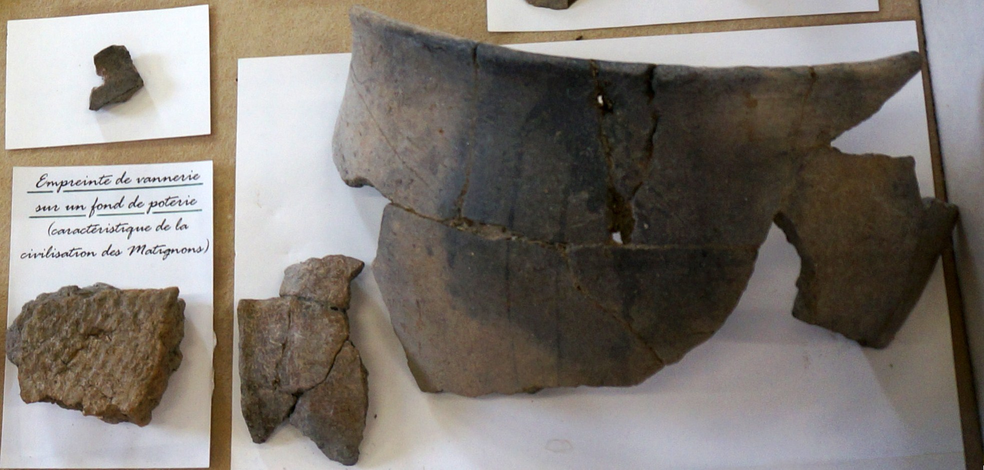 présentées au Musée archéologique de Pons.